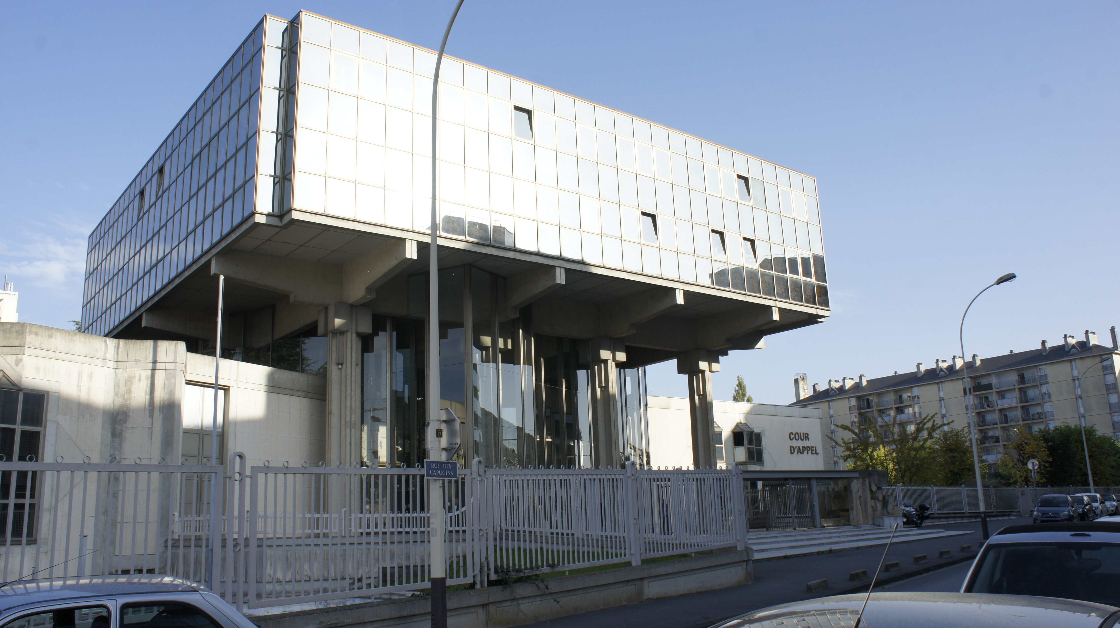 Dans la rue des Capucins, la façade de la Cour_d'appel_de_Reims .